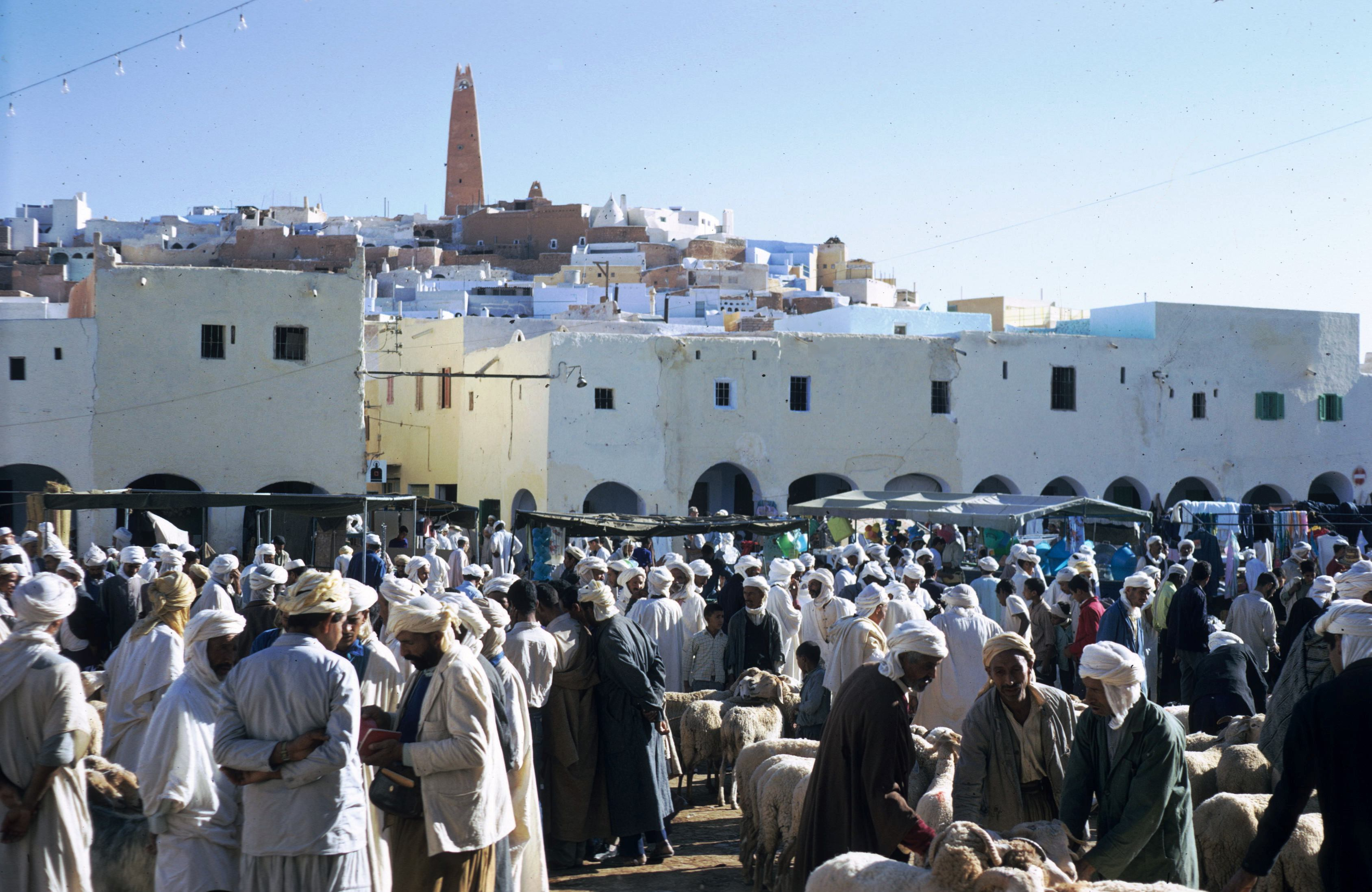 Ghardaia, Algeria self-made, October 1970